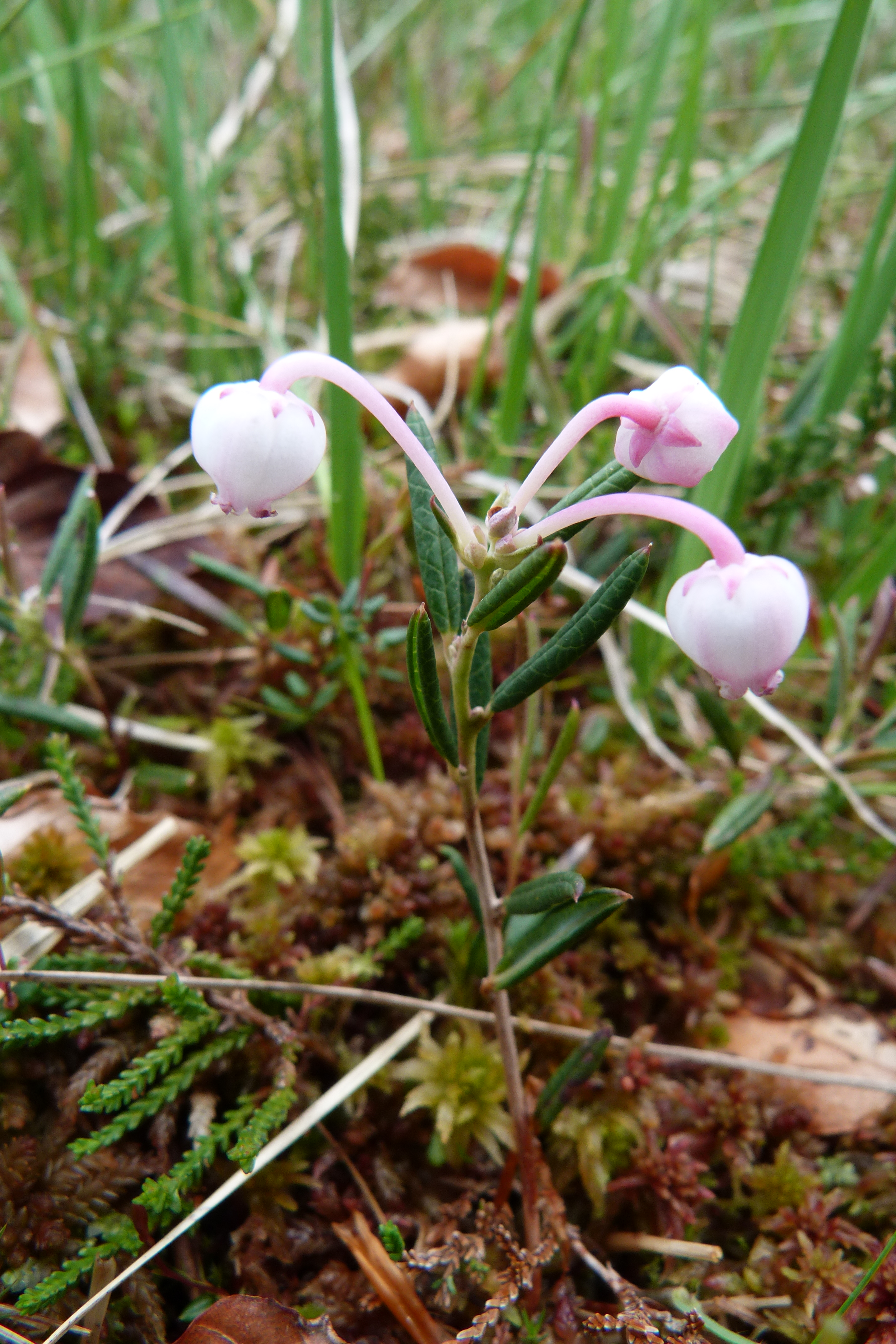 Andromeda polifolia à La Bresse (Vosges).